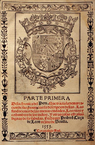 Parte primera de la chrónica del Peru